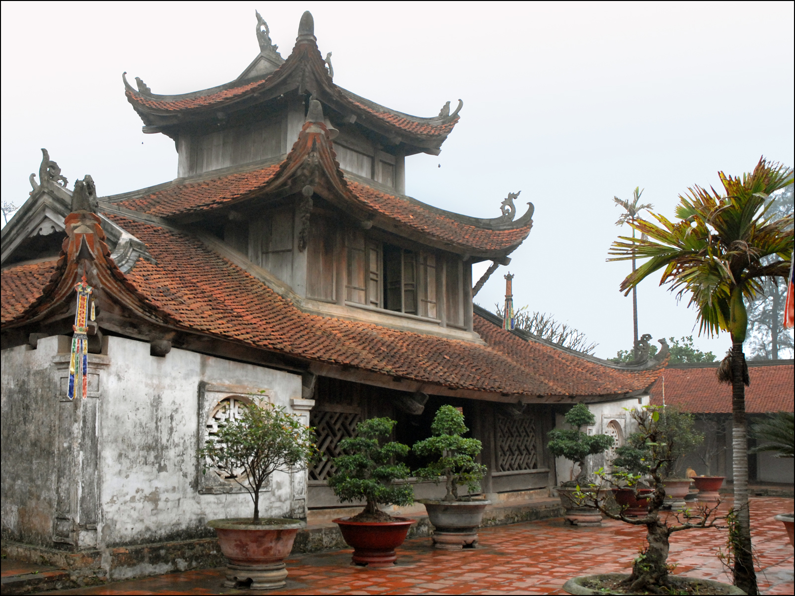 Une des cours de la pagode But Thap La pagode But Thap (Ninh-Phuc) s'élève dans le village de Dinh To, à 30 Km au sud-est de Hanoi. Elle a été érigée en 1646-1647 par le moine chinois Minh Hanh. Elle compte plusieurs bâtiments dont quatre sont entourés d'un mur d'enceinte. Les bâtiments sont reliés par des galeries.